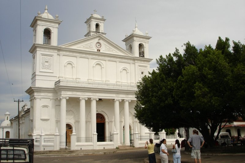 Iglesia del pueblo colonial de Suchitoto, El Salvador, Centroamérica